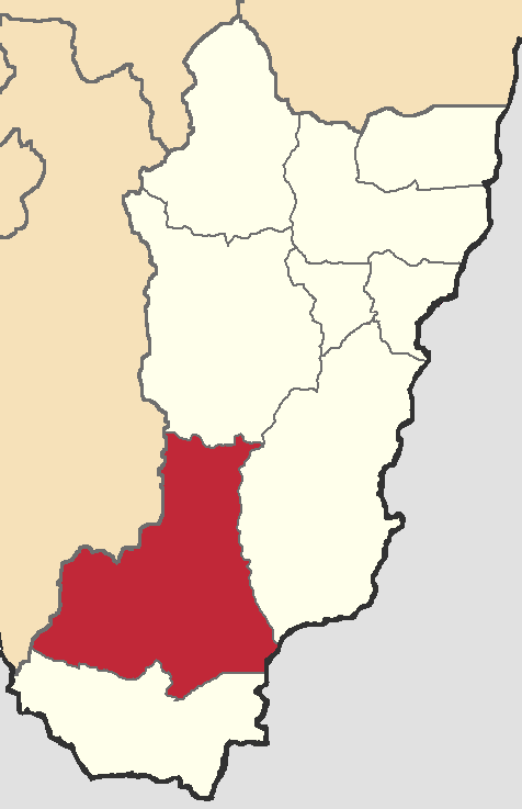 Mapa localizador del cantón en Zamora Chinchipe, Ecuador